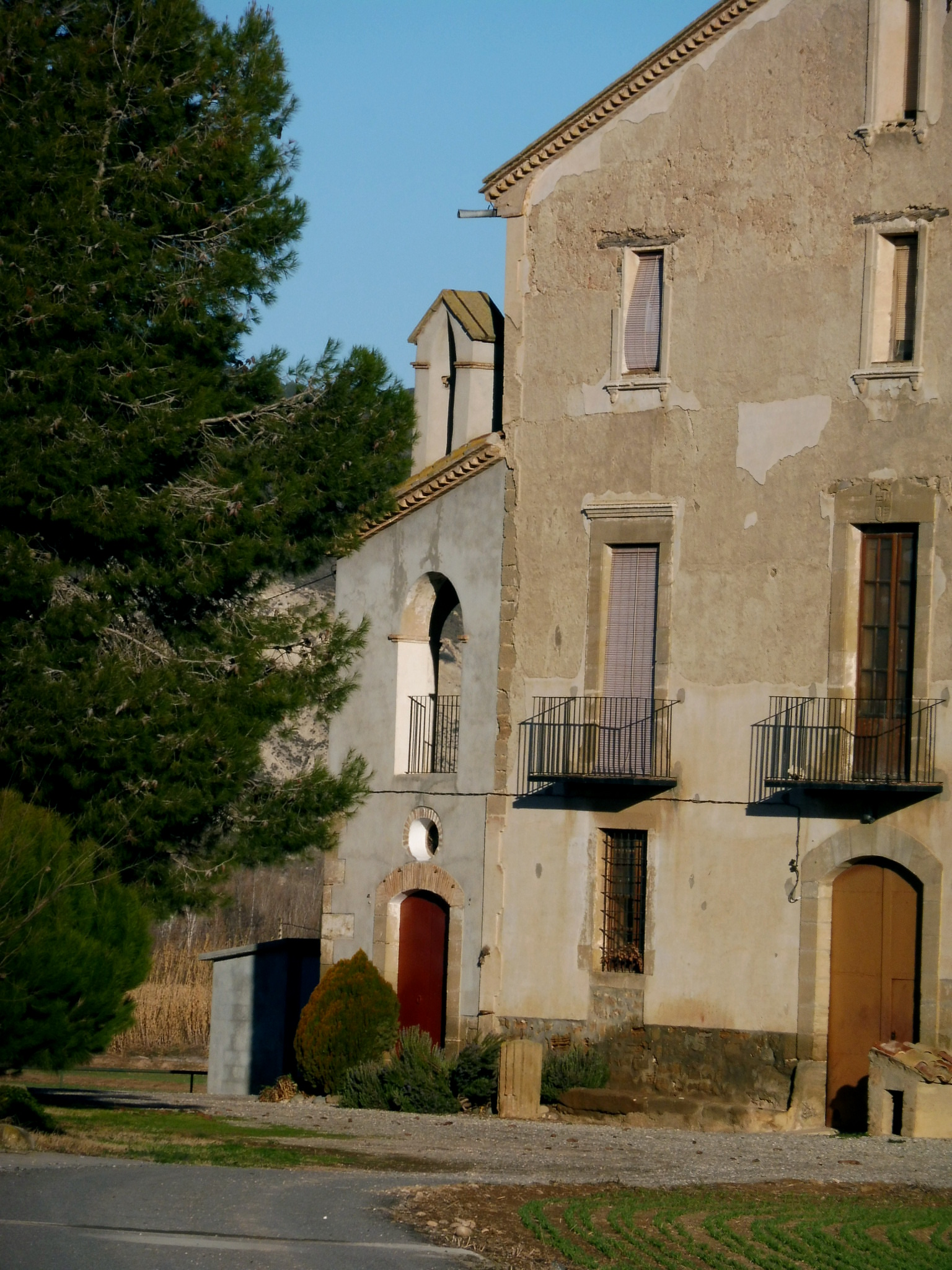 Torre Fortuny (Balaguer): capella de Sant Pere Màrtir al lateral de la masia